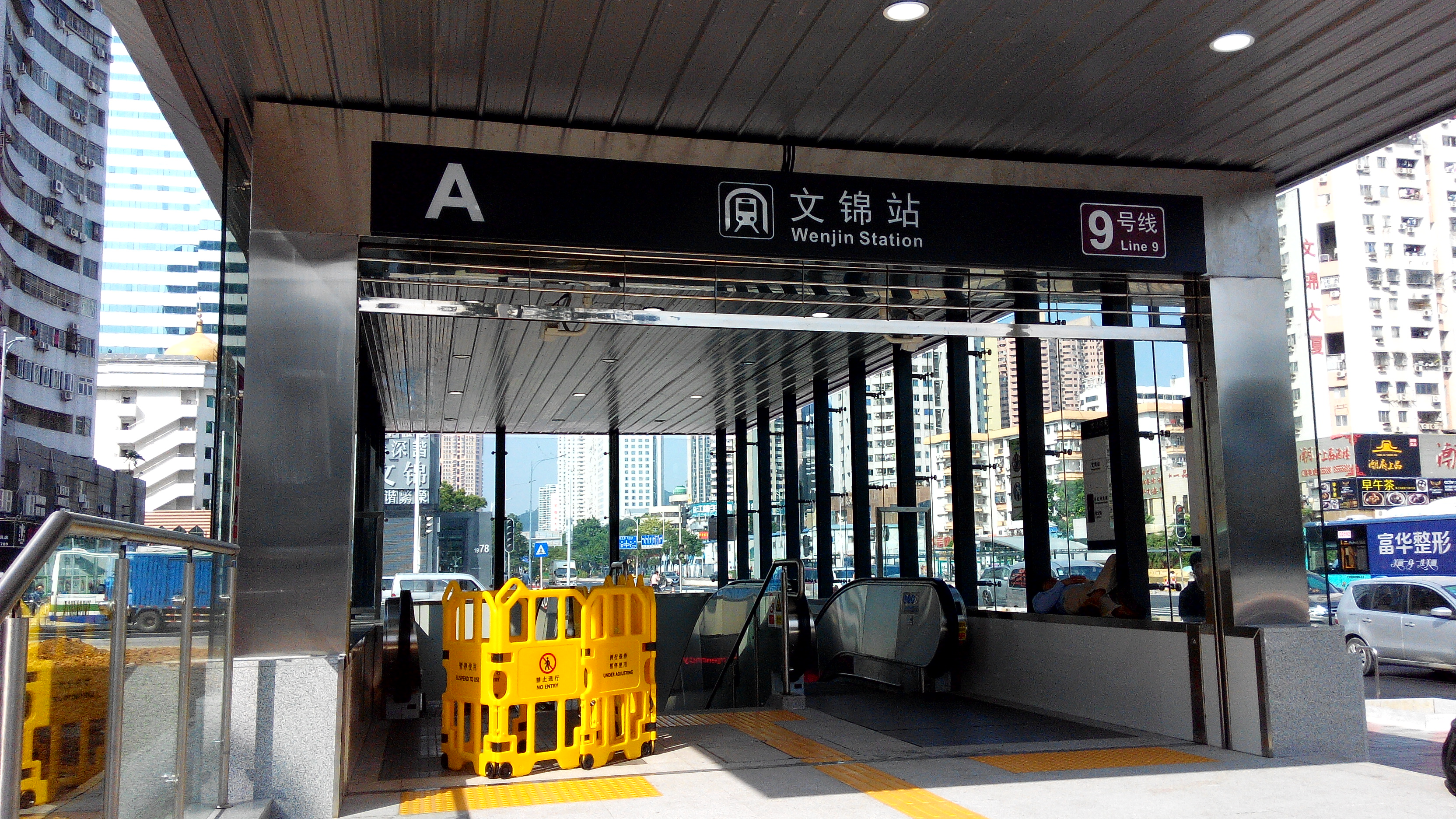 深圳地铁9号线 文锦站A出口